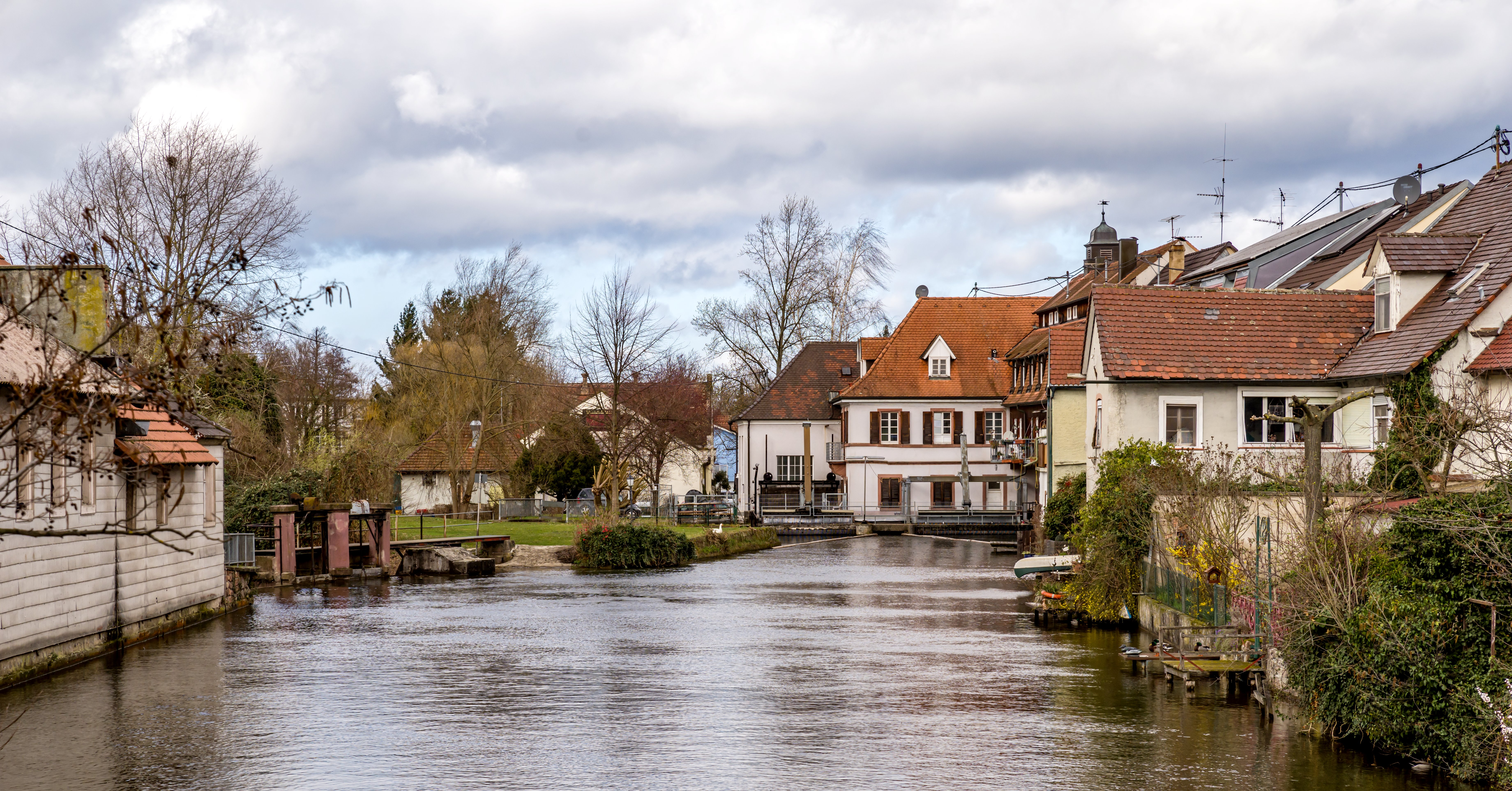 Bilder aus Kenzingen. Hier Blick auf die alte Elz von der Elzbrücke aus.